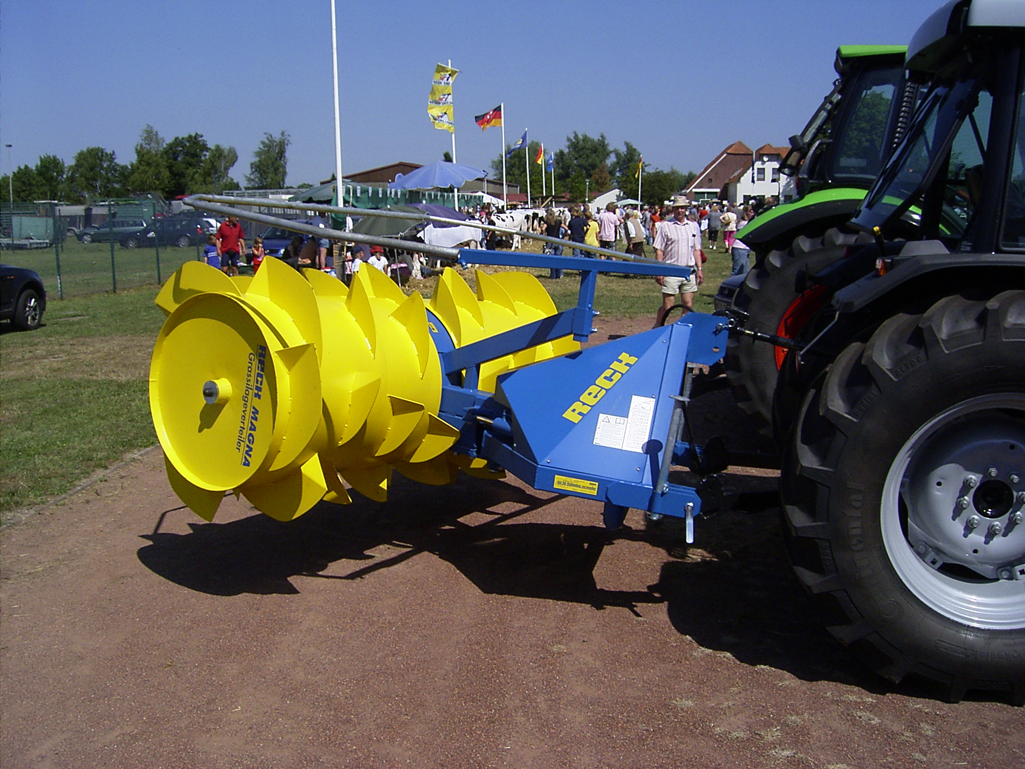 Siloverteiler zur Herstellung eines Fahrsilos. Der Siloverteiler hängt in der Dreipunkthydraulik eines Traktors und wird über die Zapfwelle angetrieben. Durch ein Gelenk und zwei Hydraulikzylinder kann die Trommel horizontal geschwenkt werden.